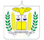 Brasão_Nova_Canaã_do_Norte_MT.gif